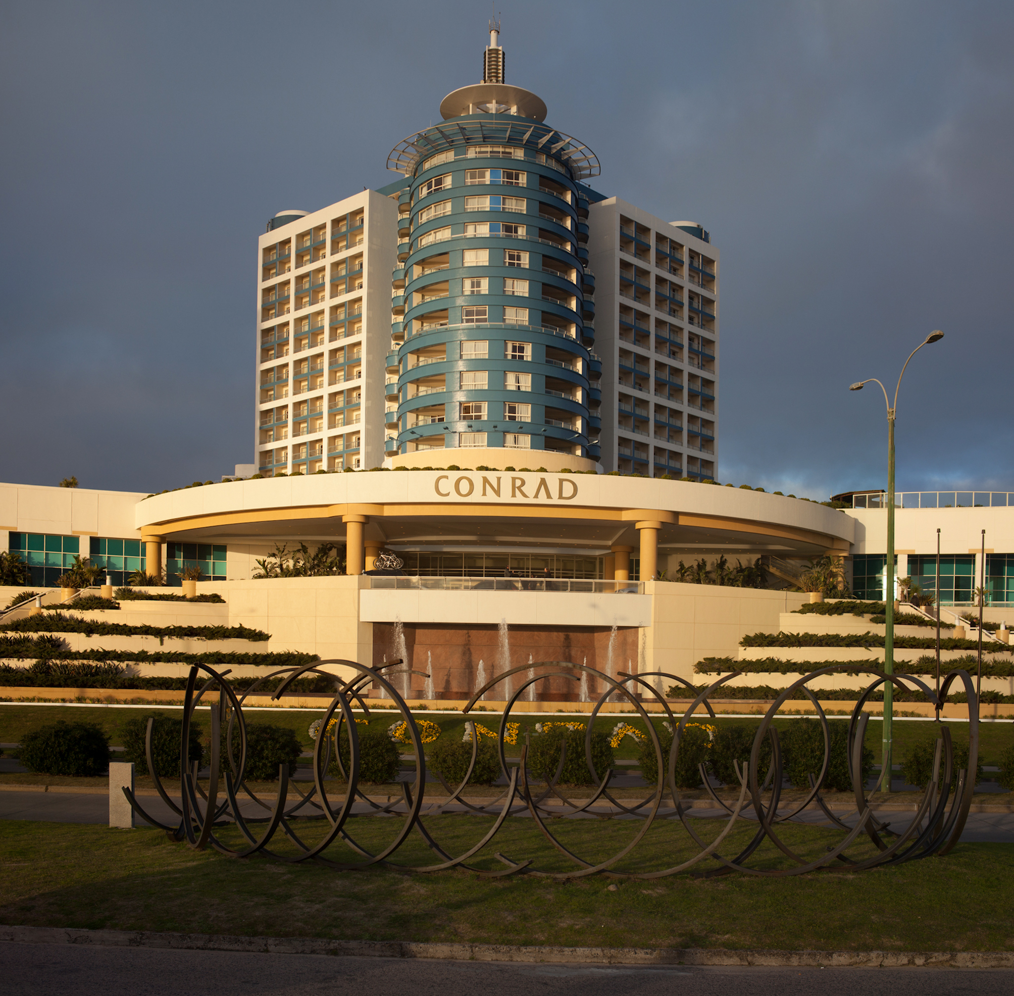 Punta del Este, Uruguay.